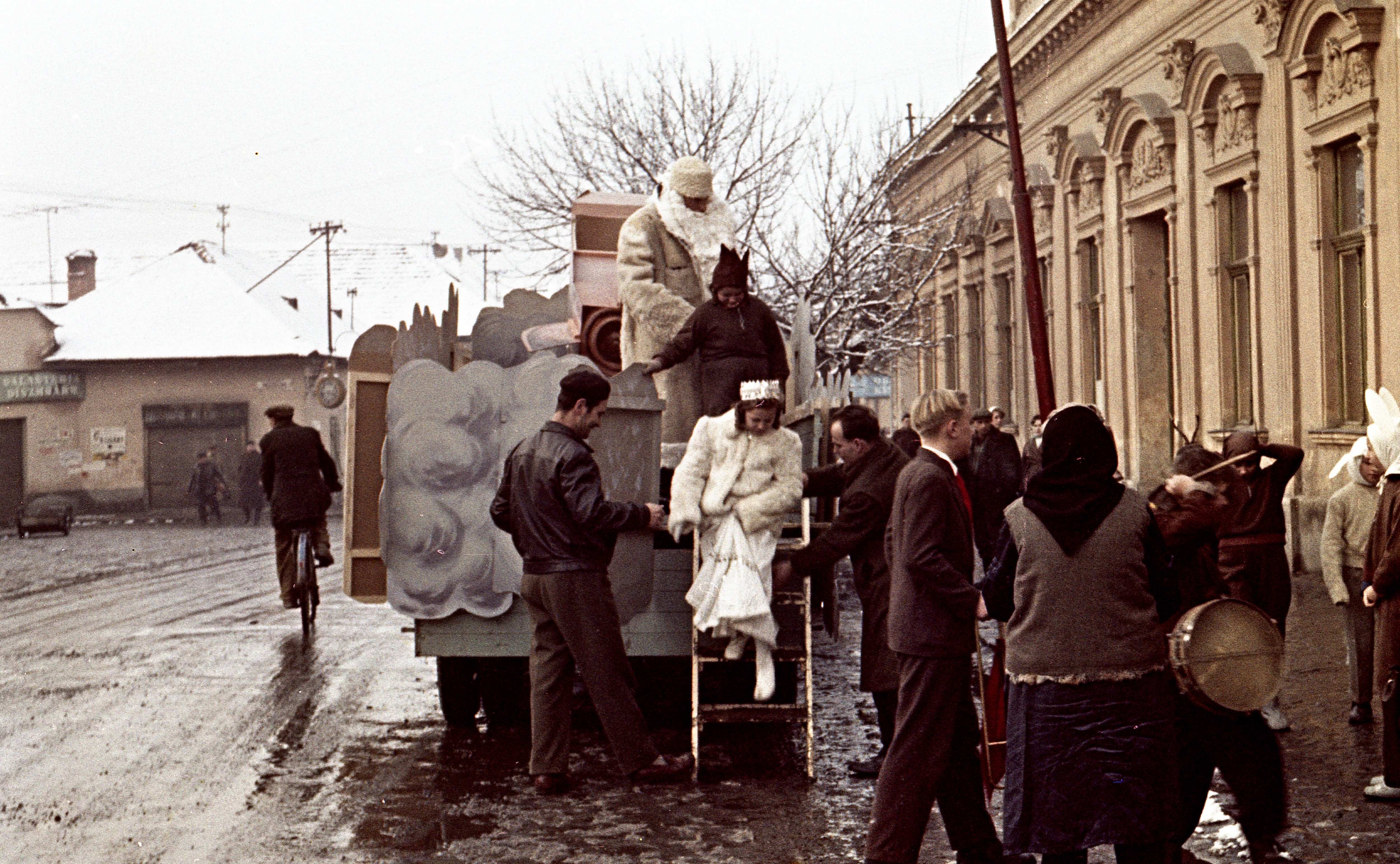 ulica Hlavná (Fő utca), balra az ulica Rázusova torkolata. Location: Slovakia, Filakovo Tags: costume, Czechoslovakia, colorful Title: ulica Hlavná (Fő utca), balra az ulica Rázusova torkolata.